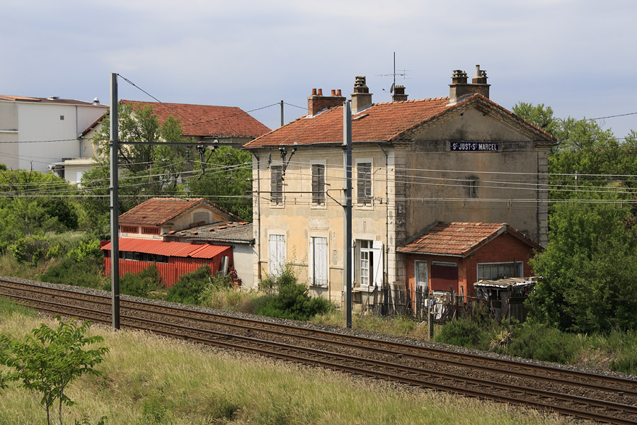 Gare de St Just-St Marcel, vue sur le bâtiment-voyageur et les voies